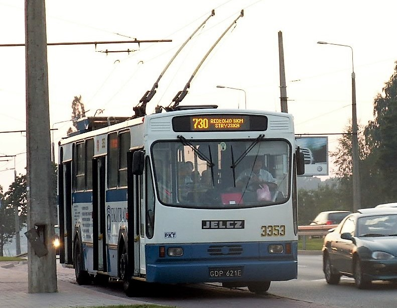 Trolejbus Jelcz PR110E linii 730, przystanek Buraczana, numer boczny 3353. Wykonay przez KPNA ze Słupska w 1990 roku.